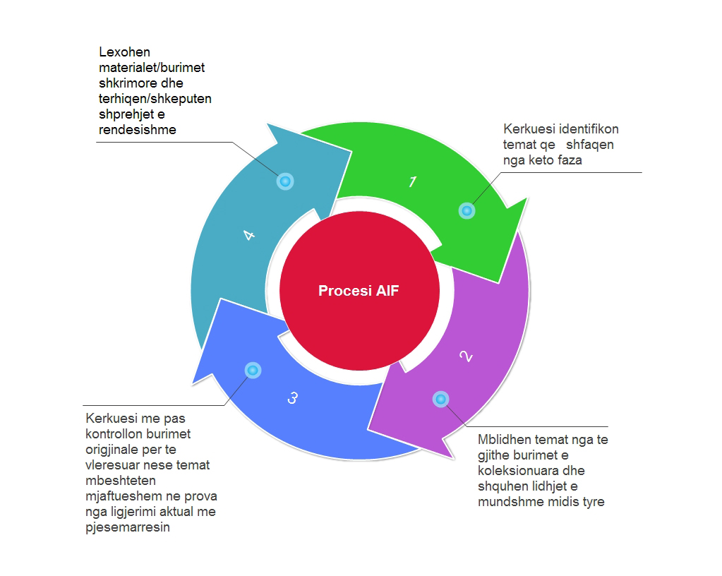 Procesi i nje analize fenomenologjike